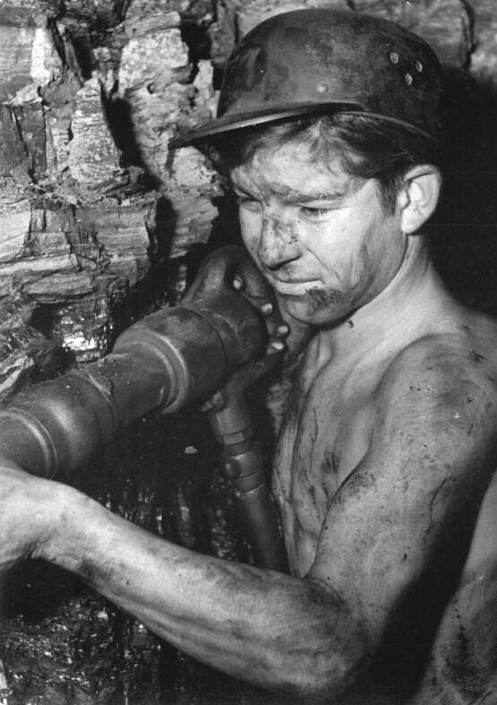 Bergarbeiter mit Presslufthammer Zentralbild Sturm 16.1.1952 Lehrlinge unter Tage.Der praktische Unterricht der Lehrlinge des Karl Liebknecht-Schachtes im Zwickau-Ölsnitzer Steinkohlenrevier ist vor Ort unter Tage.Die Lehrausbilder, Kumpel und Steiger, bemühen sich, den Jüngsten des Schachtes ihre Erfahrungen zu vermitteln und mit den Kniffen ihrer Arbeit vertraut zu machen.UBz: Roland Förster arbeitet vor Ort mit dem Preßlufthammer.